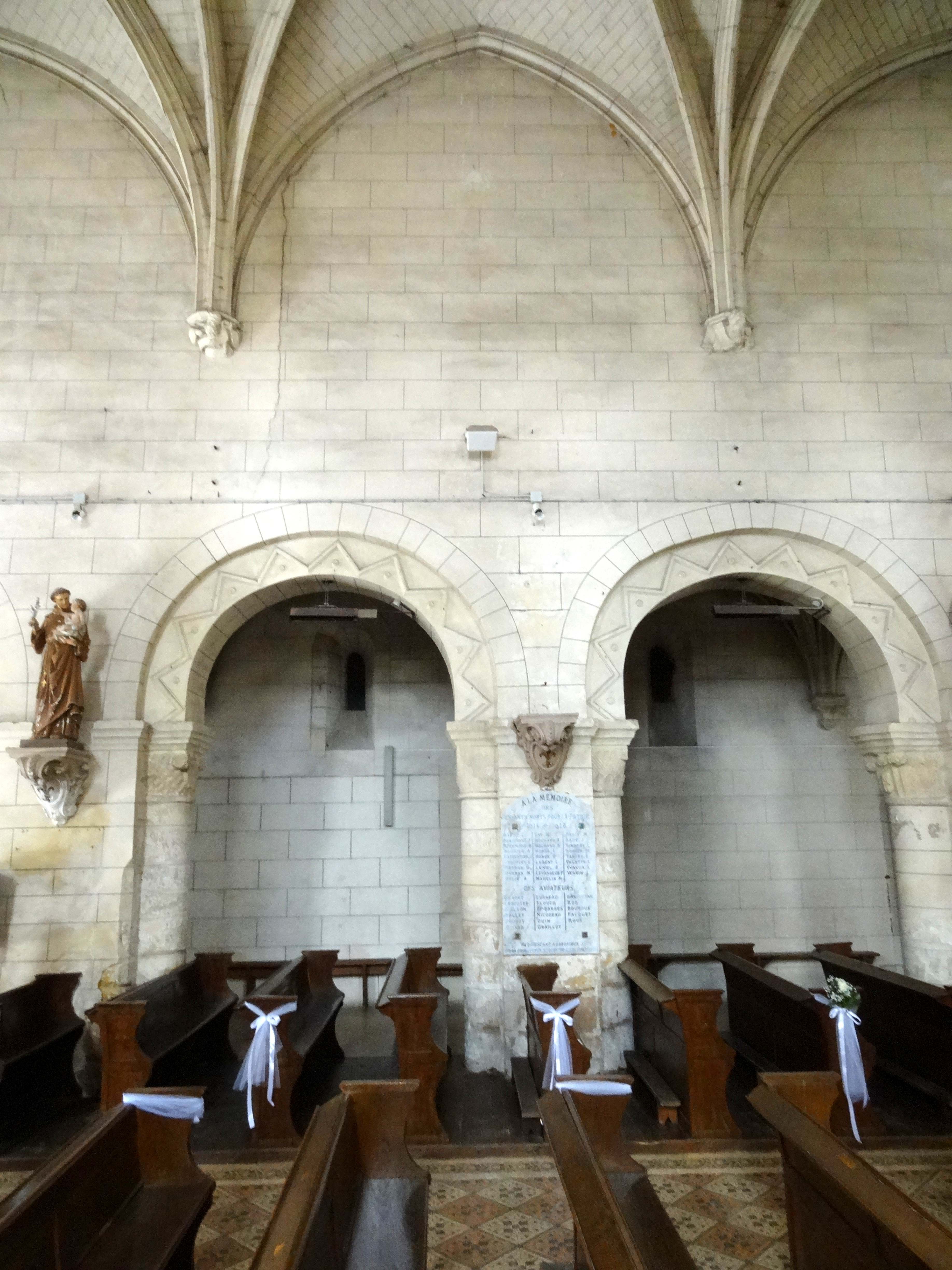 Intérieur de l'église - voir titre.